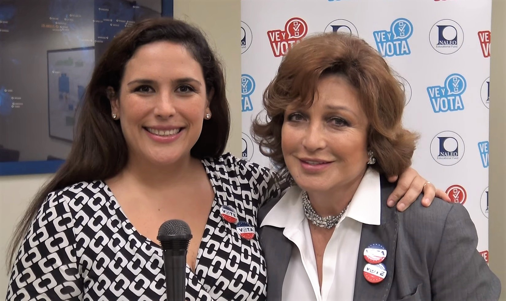 Angélica Vale y Angélica Maria contestan sobre Luis Alberto Aguilera, hijo secreto de Juan Gabriel Copyright Dulce Osuna & SUSCRIBETE a mi canal para recibir NUEVOS videos y entrevistas de cine y entretenimiento TODOS LOS DIAS Visita "Lo mejor del Cine y Entretenimiento"